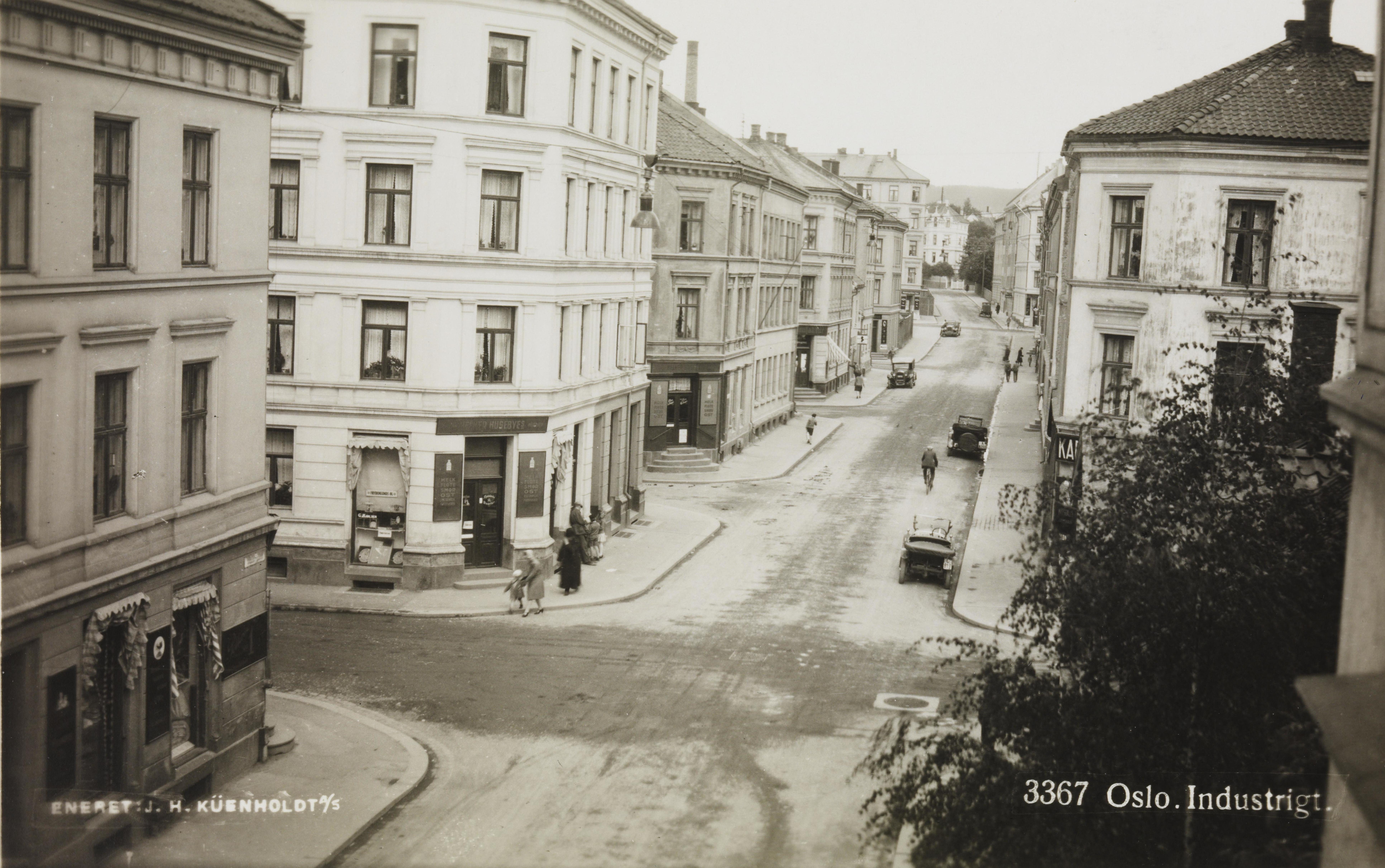 Bildet er hentet fra Nasjonalbibliotekets bildesamling Industrigata,Majorstua, Oslo, Oslo